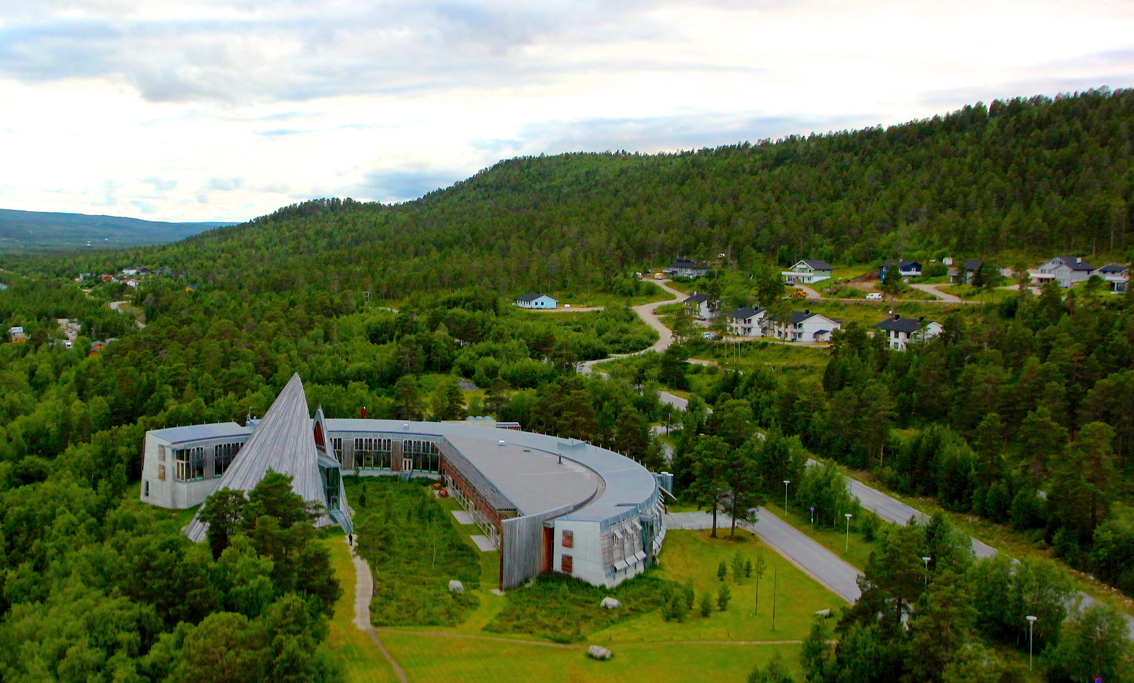 Foto: Jan Helmer Olsen.